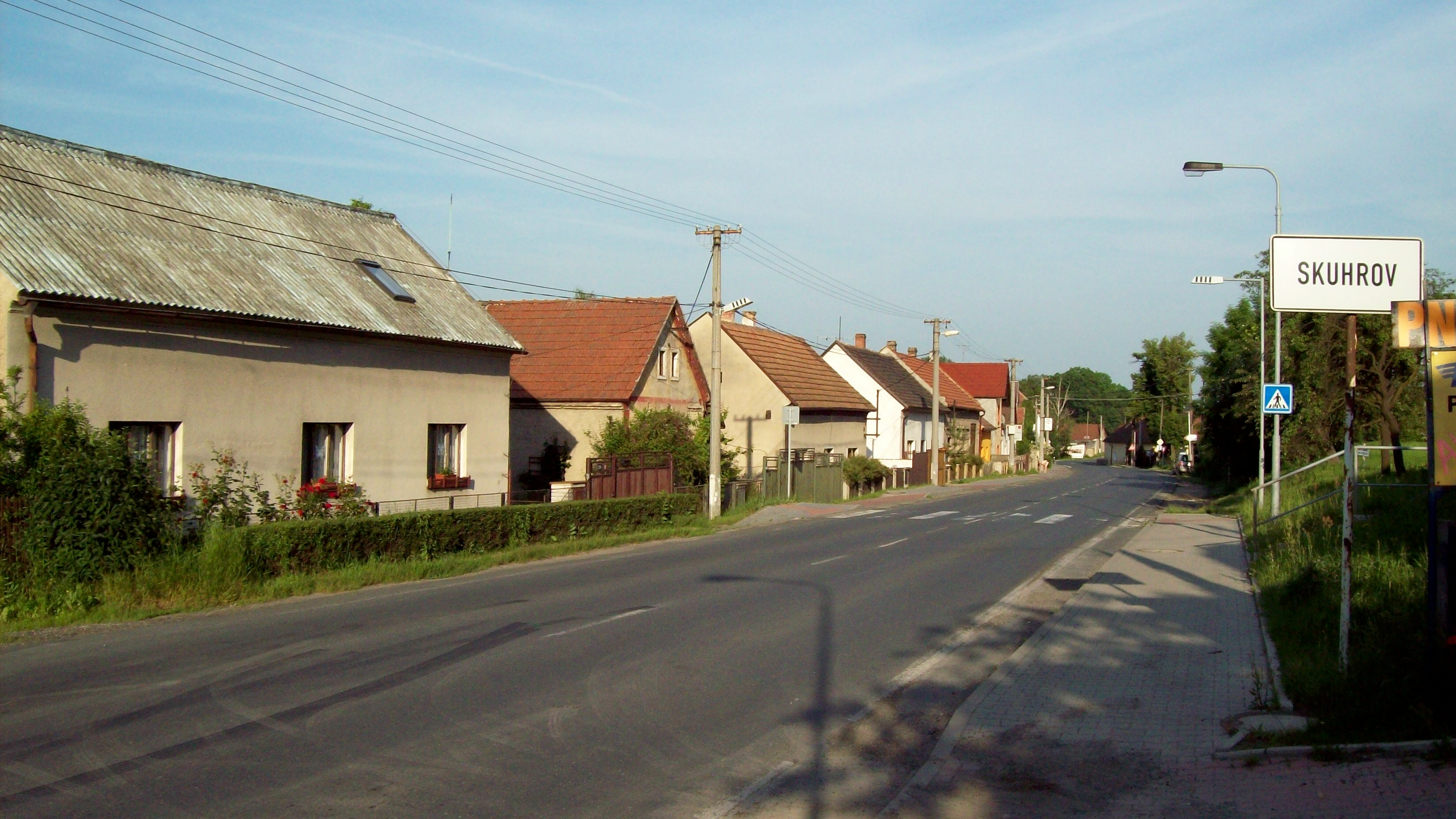 Mladoboleslavská ulice, Skuhrov, Velký Borek. Výjezd z Mělníka.